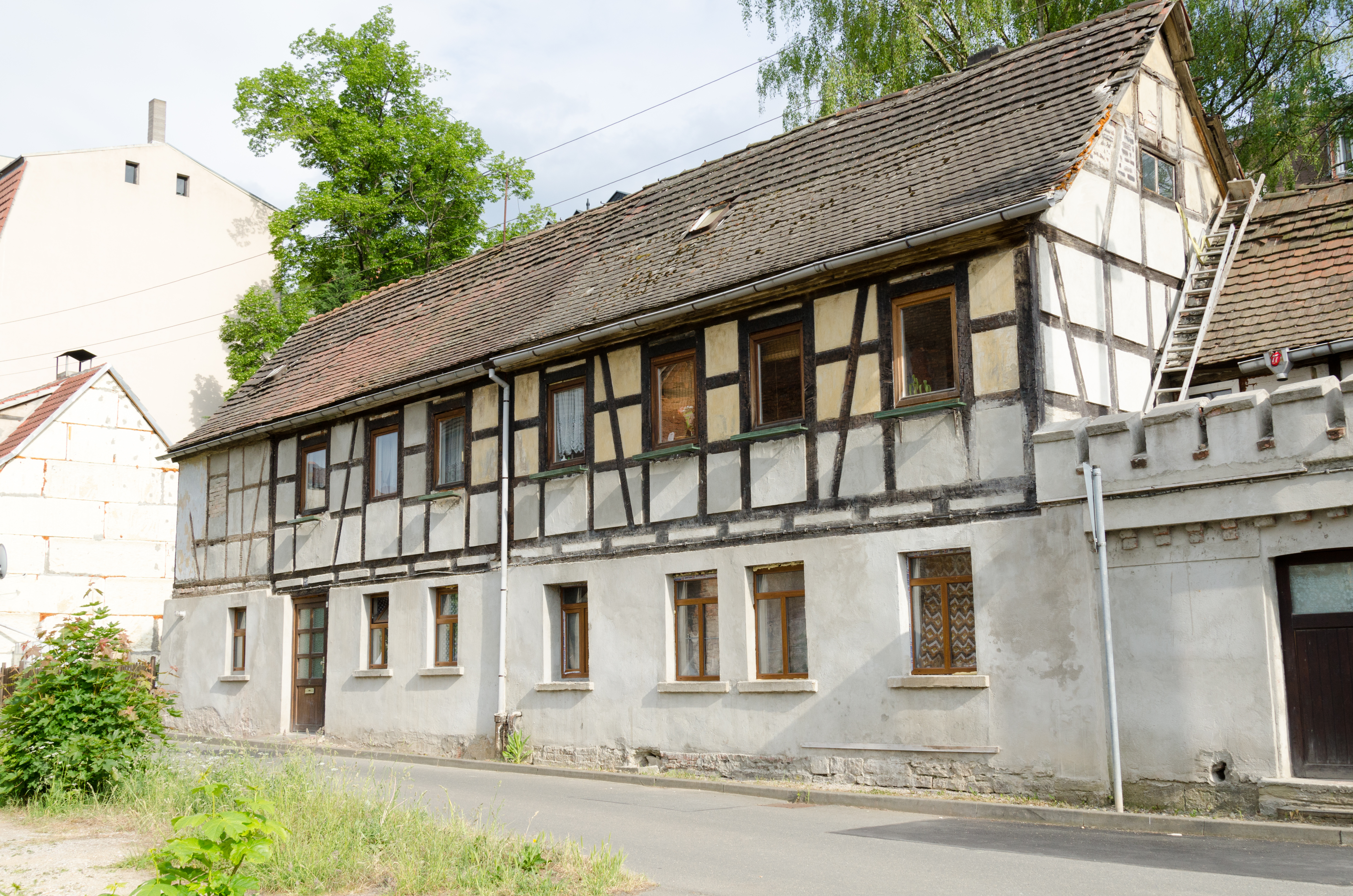 Zeitz, Rothestraße 25, 24